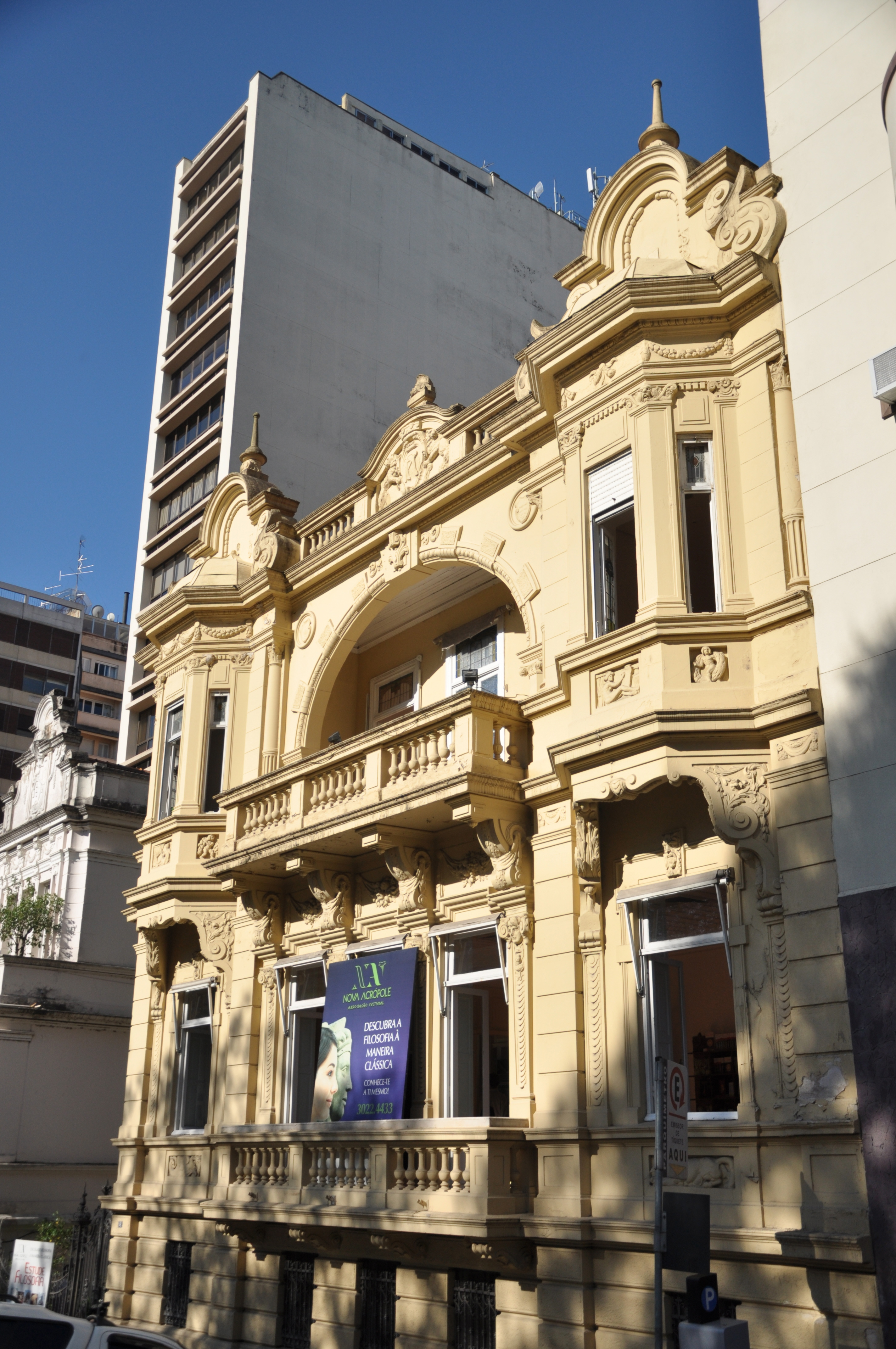 Fachada do Solar Palmeiro, sede da Nova Acrópole de Porto Alegre.